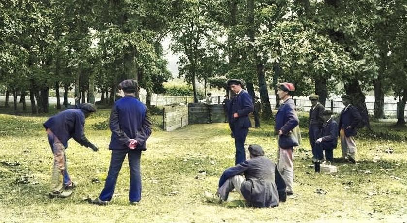 Reproduction numérique et colorisée d'une plaque de verre réalisée par Félix Arnaudin, matièreː verre, techniqueː négatif